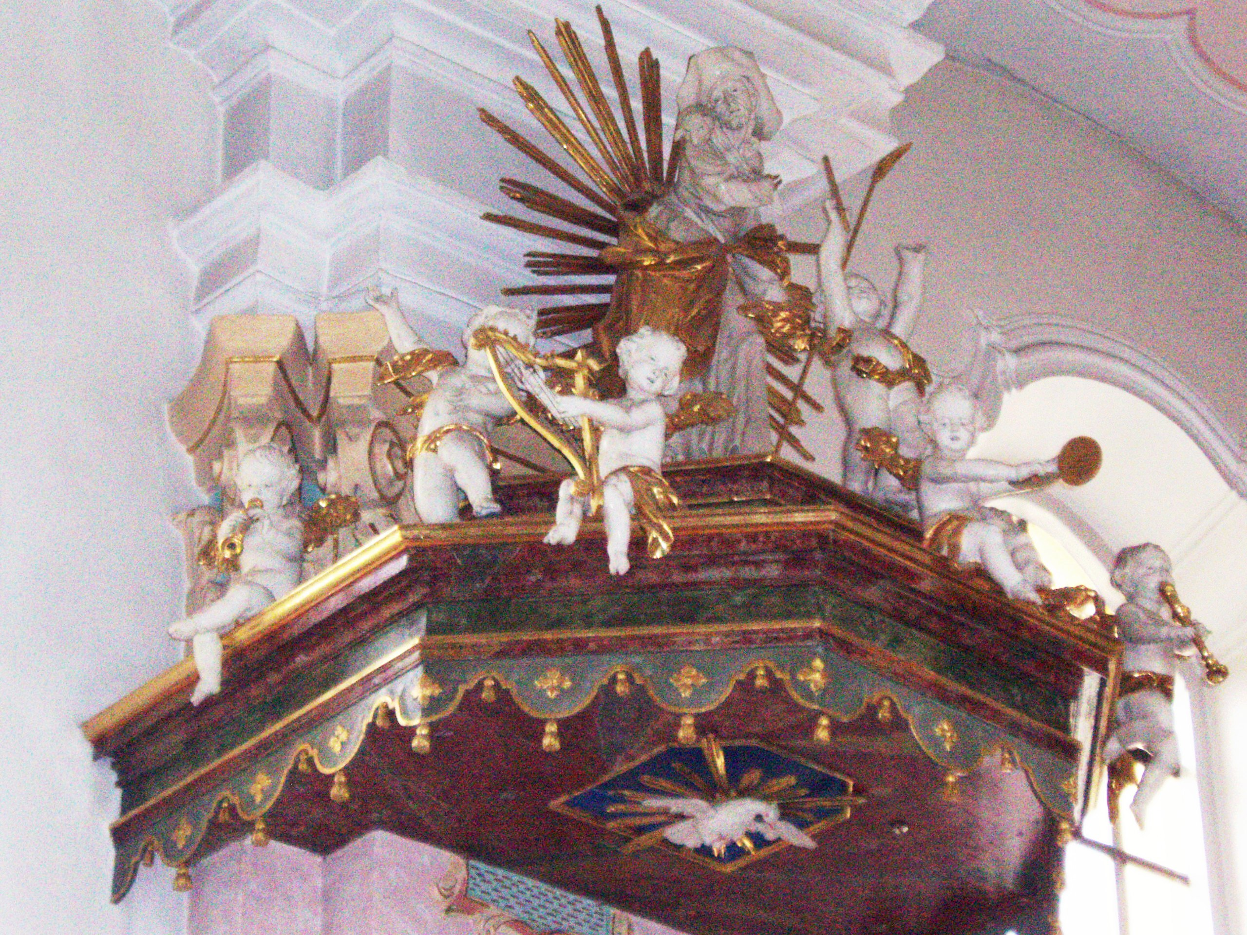 Mendorf_im_Landkreis_Eichstätt,_Pfarrkirche,_Guter_Hirte_von_Ignaz_Günther